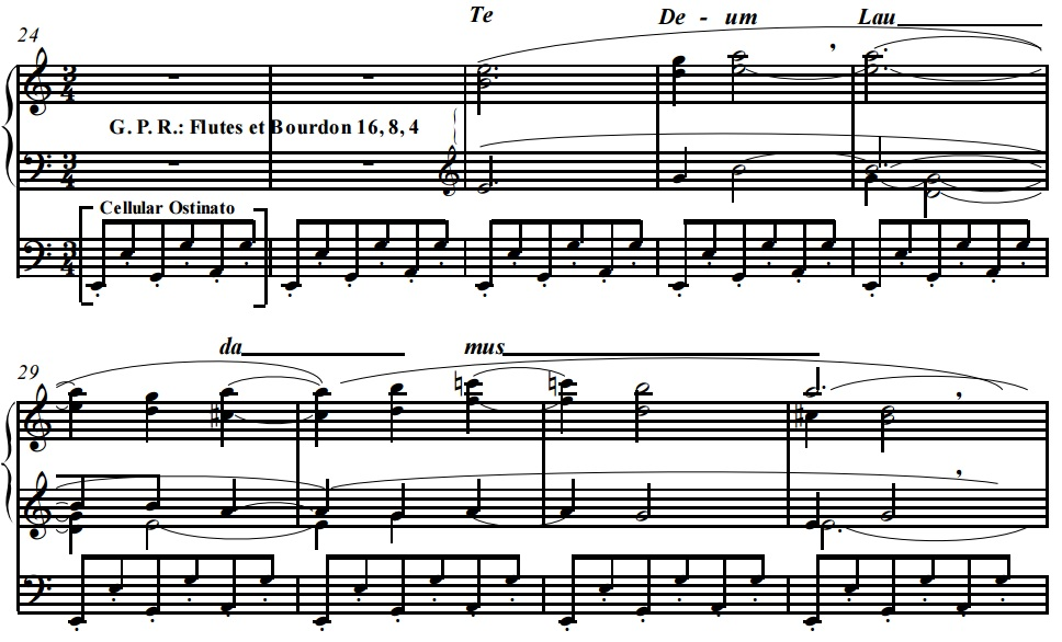 Te Deum Demessieux op 11 compases del 24 a 29